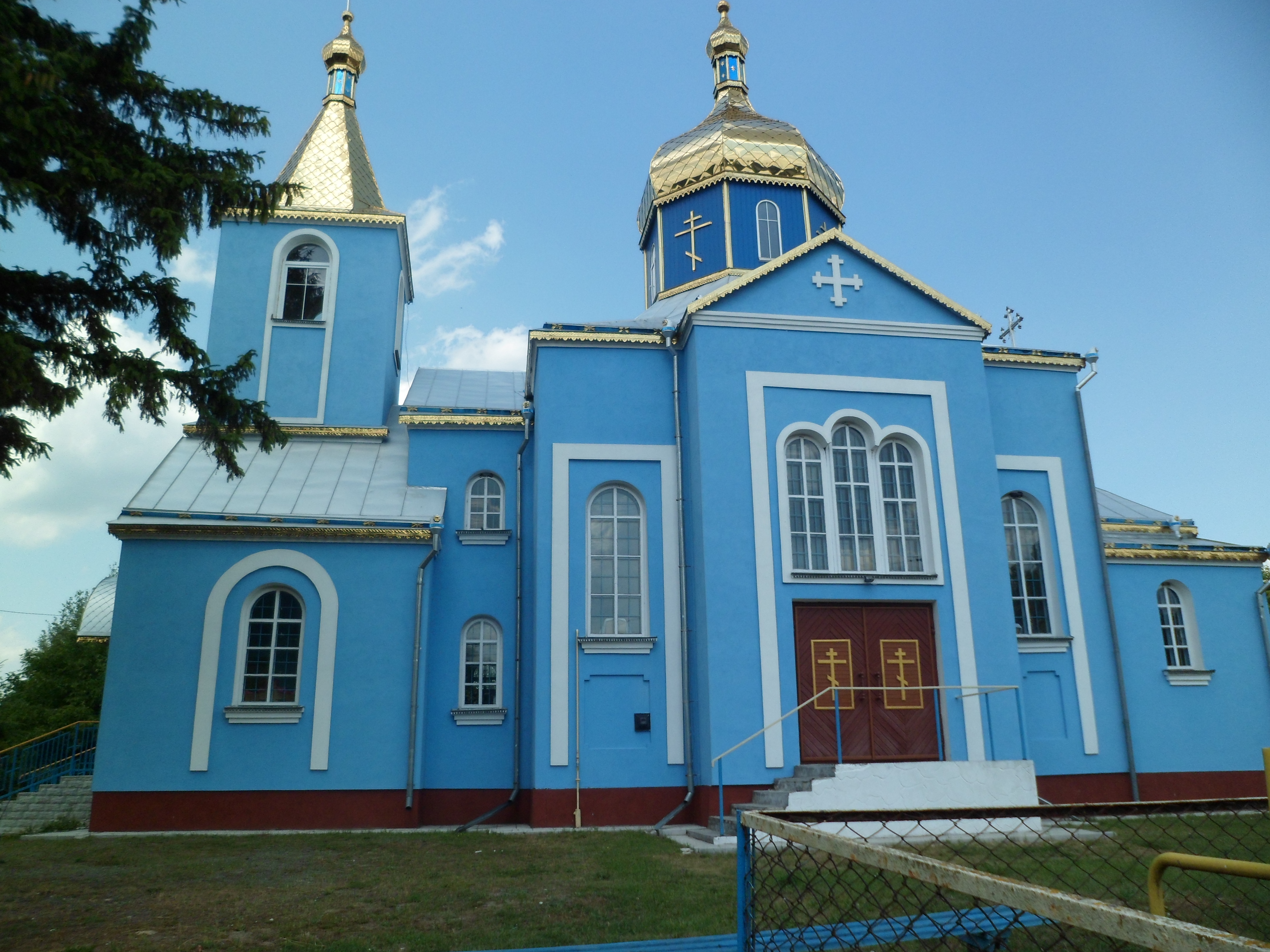 Церква Параскеви П”ятниці, Сереховичі